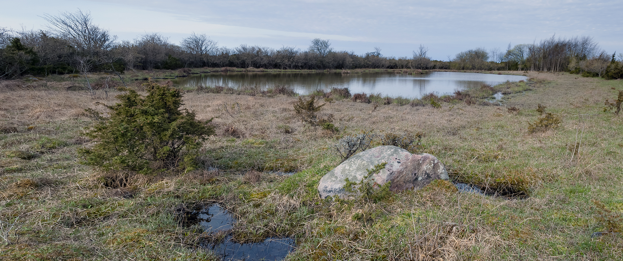 Osmussaare keskosa maastik.